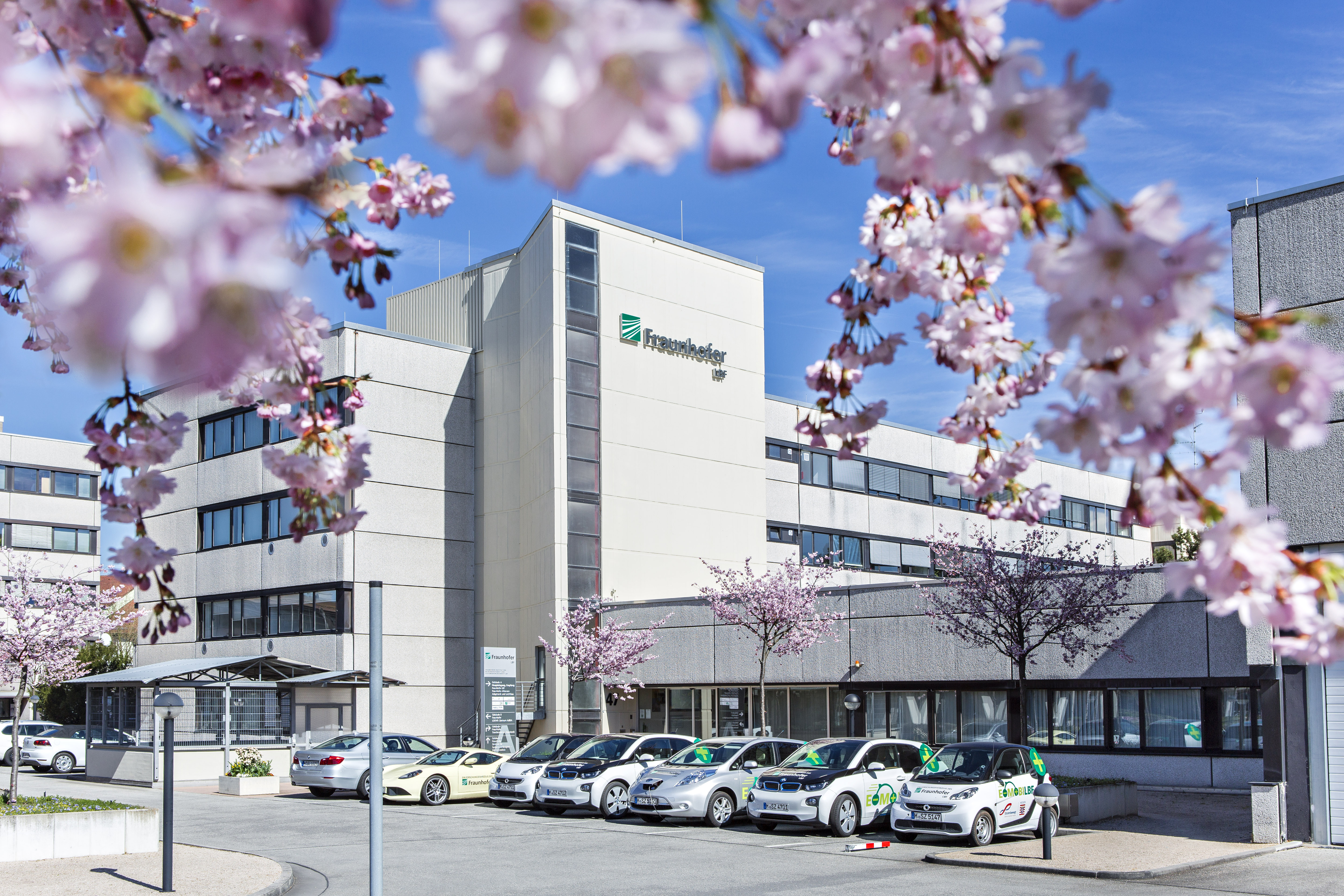 Hauptgebäude des Fraunhofer LBF auf dem Institutscampus in Darmstadt Kranichstein